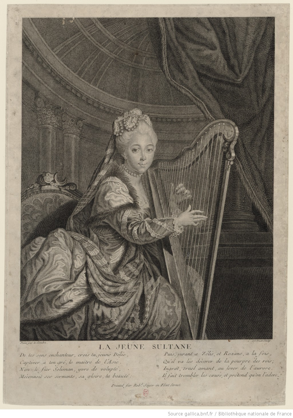 Titre : Justine Favart, rôle de la jeune sultane dans "Soliman II ou Les Trois sultanes" de Ch.-S. Favart / César Corbutt, d'après Louis-Pierre Le Gendre Éditeur : Robert Sayer (Londres) Date d'édition : 1761 Sujet : Favart, Justine (1727-1772) -- Portraits Sujet : Portraits Type : image fixe Type : estampe Format : 1 burin ; 39,5 x 28 cm Format : image/jpeg Format : Nombre total de vues : 1 Description : Appartient à l’ensemble documentaire : IconMUS1 Description : Appartient à l’ensemble documentaire : IconMUSNum Description : Appartient à l’ensemble documentaire : IconMUS0 Droits : domaine public Identifiant : ark:/12148/btv1b8417935t Source : Bibliothèque nationale de France, département Musique, Est.FavartJ.002 Notice du catalogue : Notice de recueil : Notice du catalogue : Appartient à : Justine Favart (1727-1772) Notice du catalogue : Provenance : Bibliothèque nationale de France Date de mise en ligne : 28/07/2010